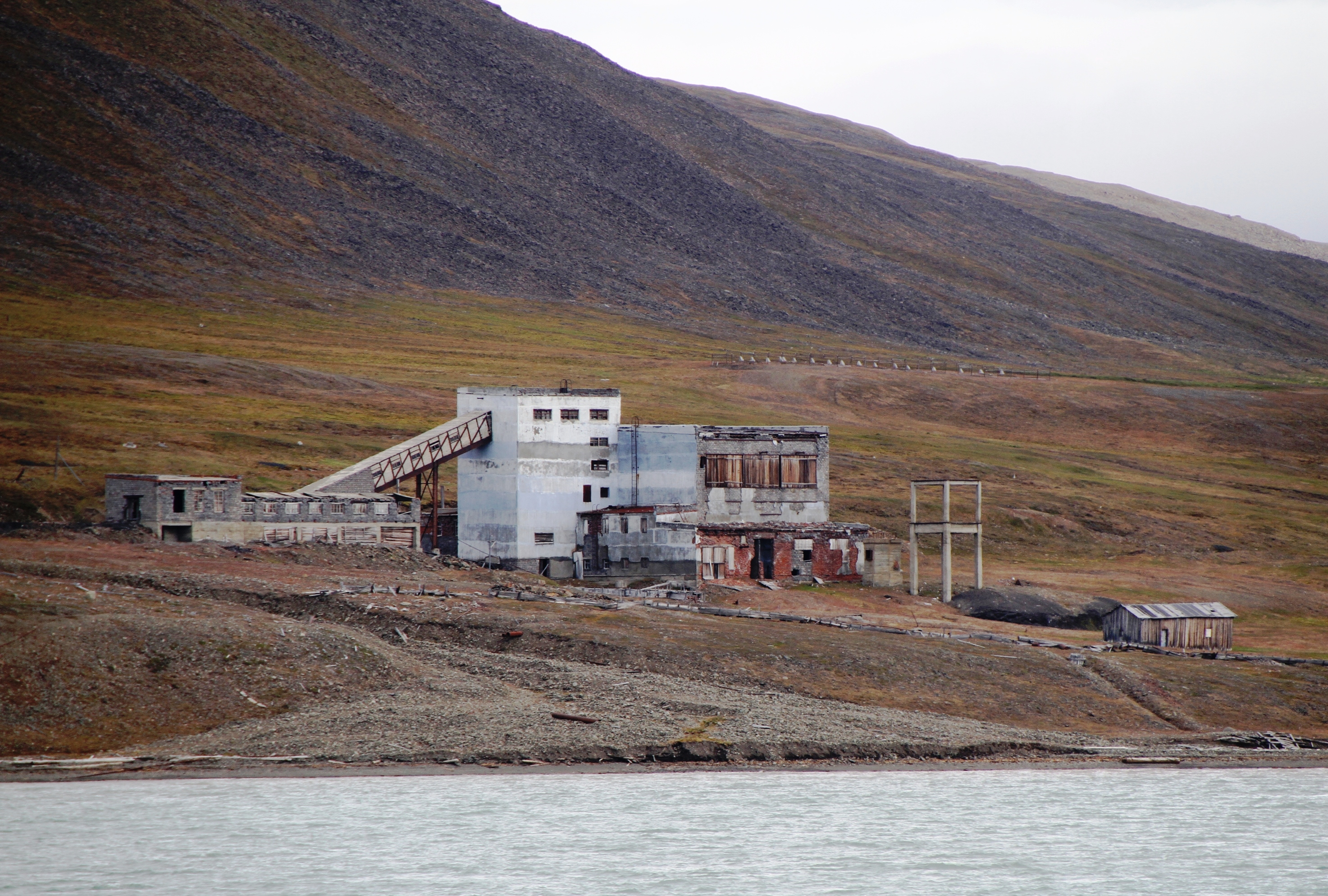 Coles Bay, former mine town in Spitsbergen until the 1960s, halfway between longyearbyen and barentsburg.